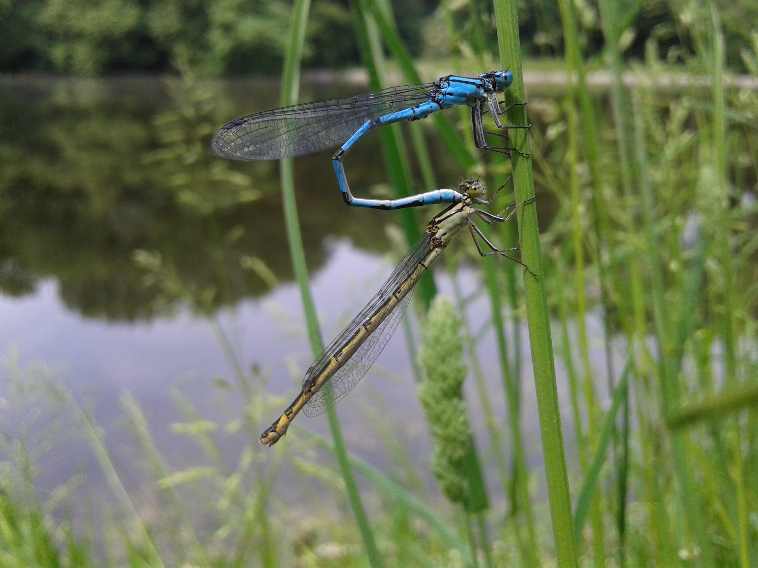 Enallagma cyathigerum, l'Agrion porte-coupe devant son étang